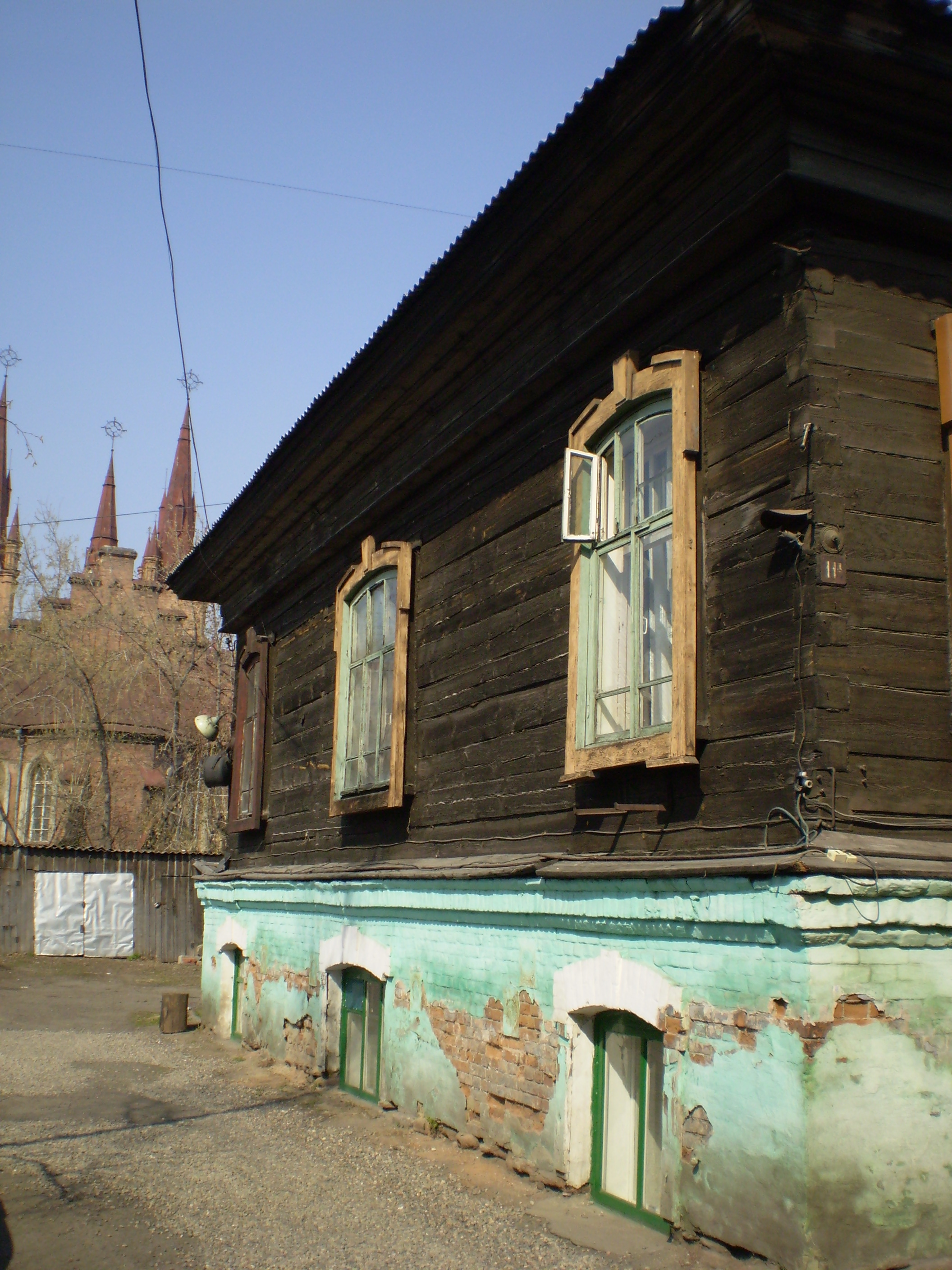 Полукаменный дом в Красноярске. Бывший Архирейский переулок